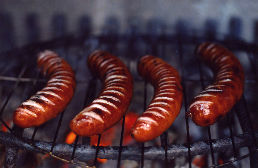 Kiełbasa z grilla